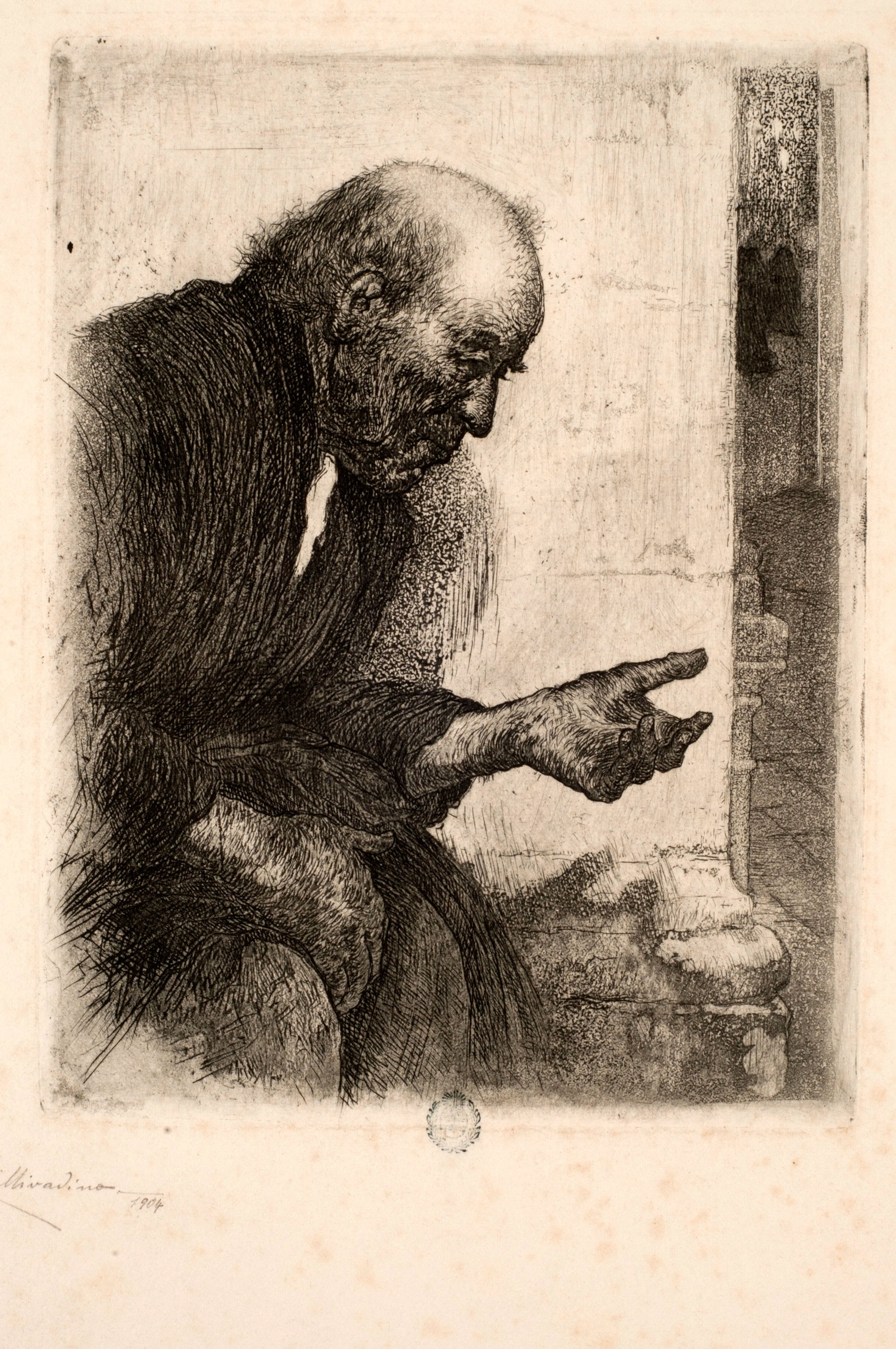 Pío Collivadino, El mendigo. 1904. 26,7 x 20,5 cm, plancha: 16,1 x 12 cm, aguafuerte sobre papel. Inv. 1300.